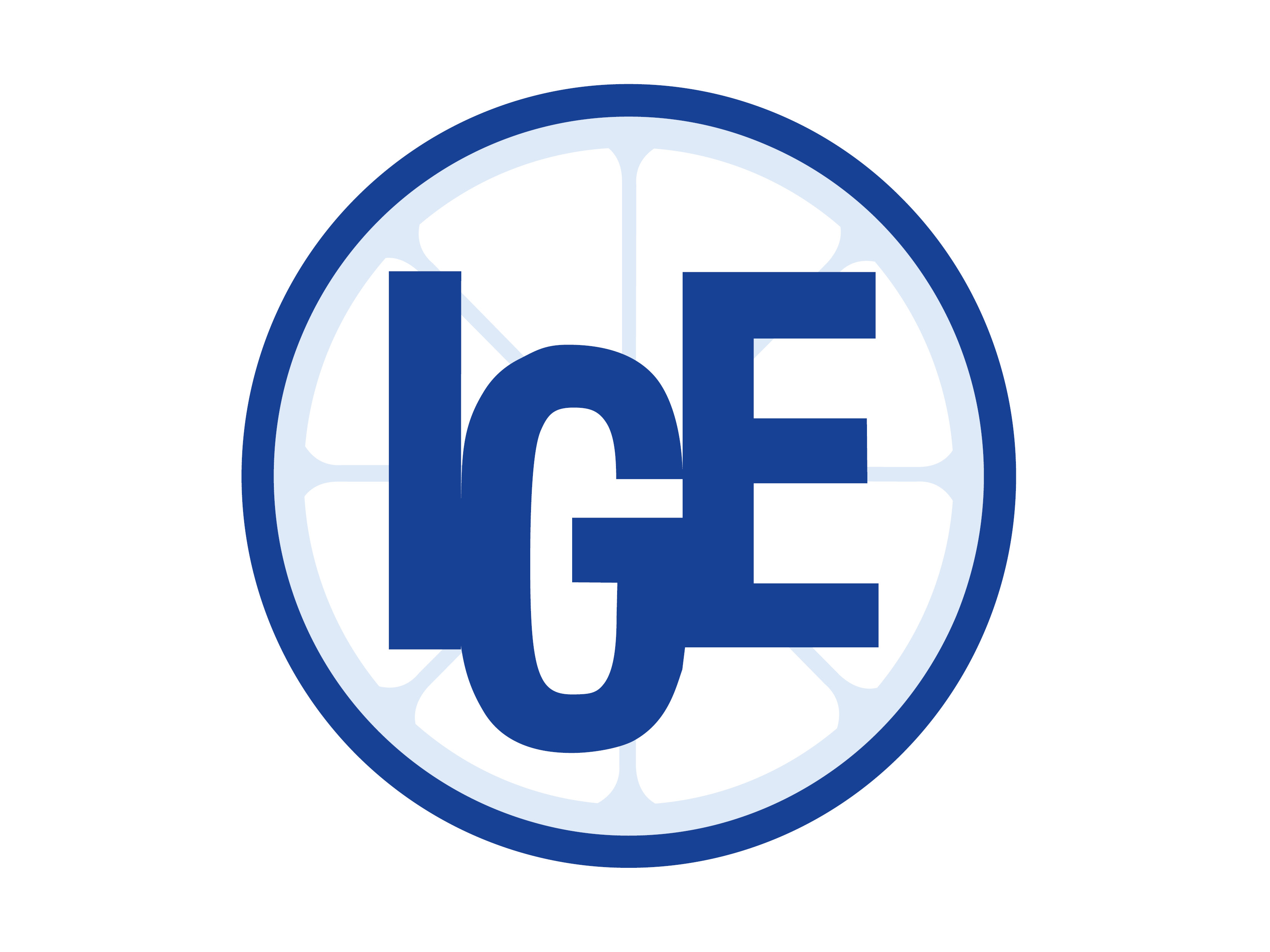 Logo Internationale Gesellschaft für Eisenbahnverkehr